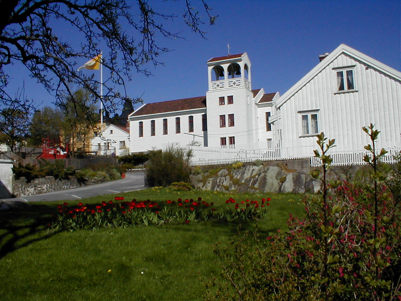 St. Franciskus Xaverius kirke før utvidelsen i 2009-10.